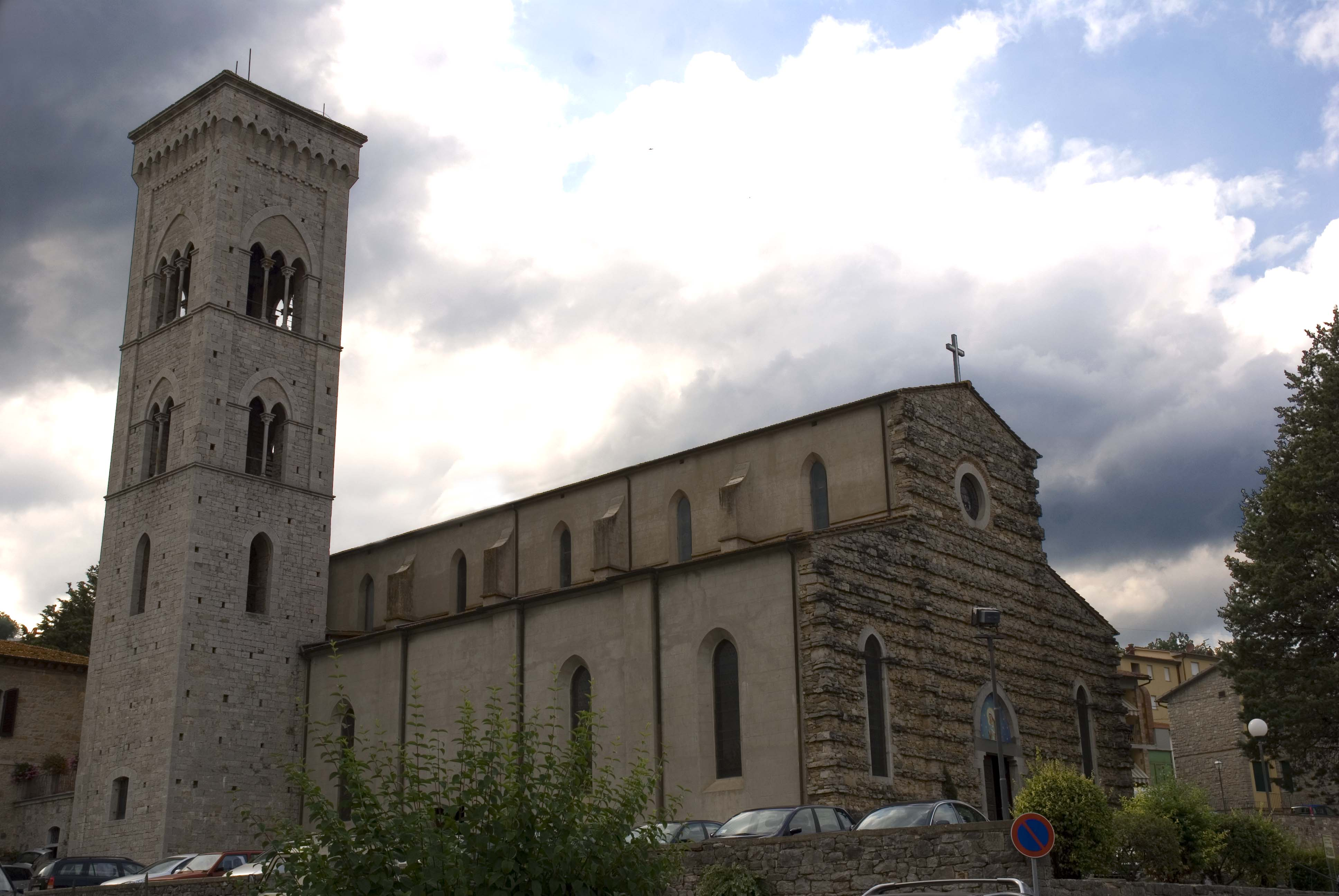 Chiesa di San Sigismondo (Gaiole in Chianti)